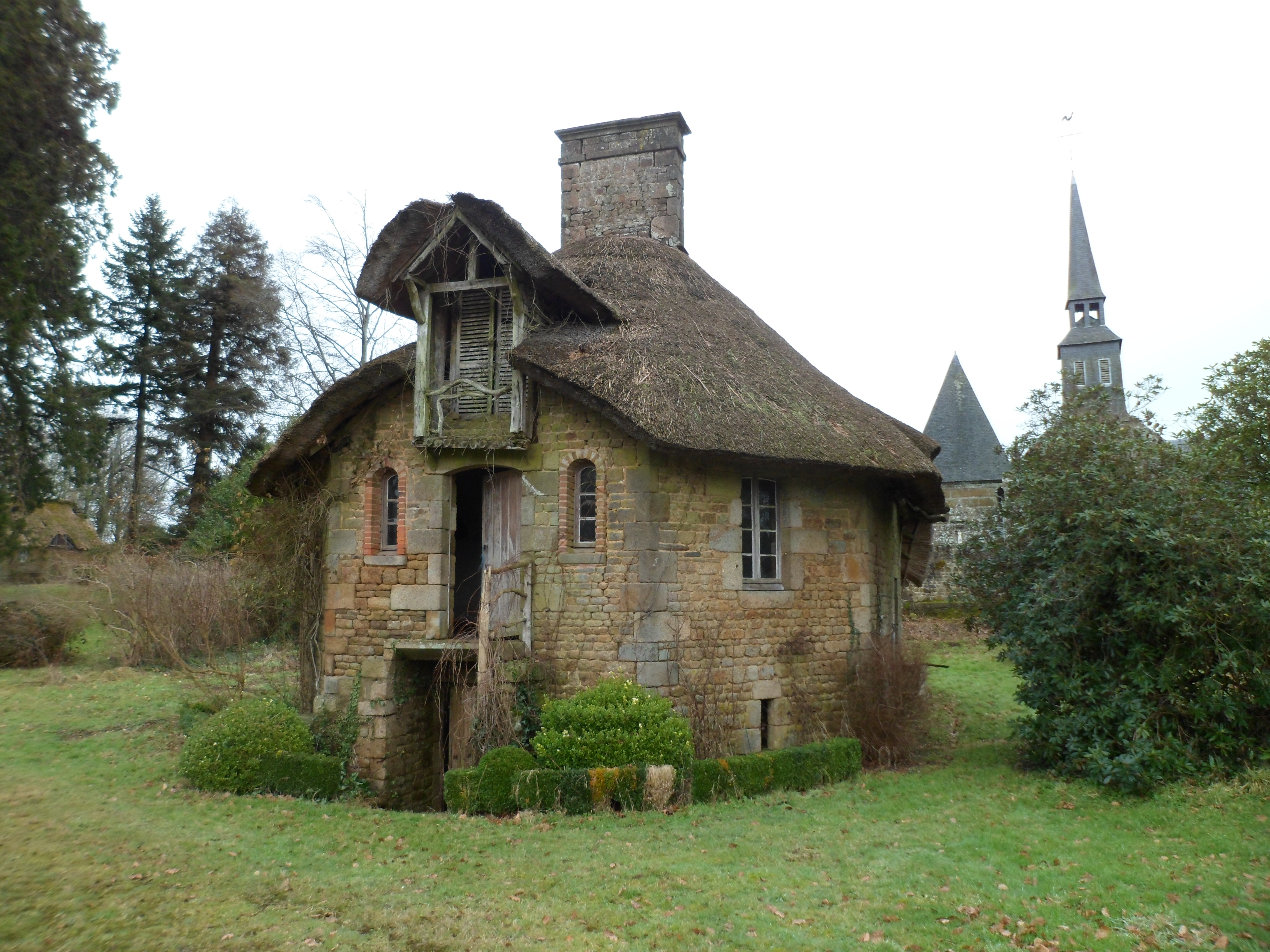 chaumière de 1830 Domaine de l'ancien château de Saint-Symphorien